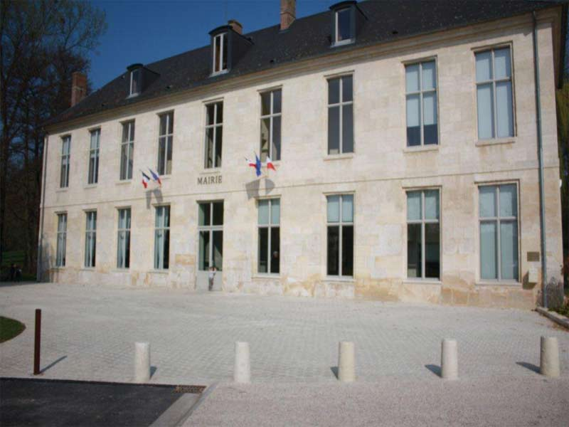 Mairie de esches